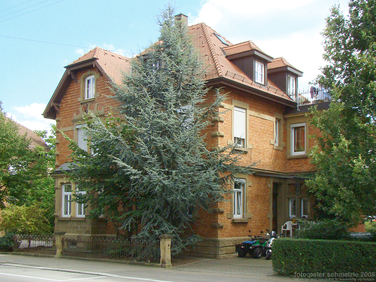 Denkmalgeschütztes Gebäude Kolpingstr. 14 in Heilbronn-Sontheim